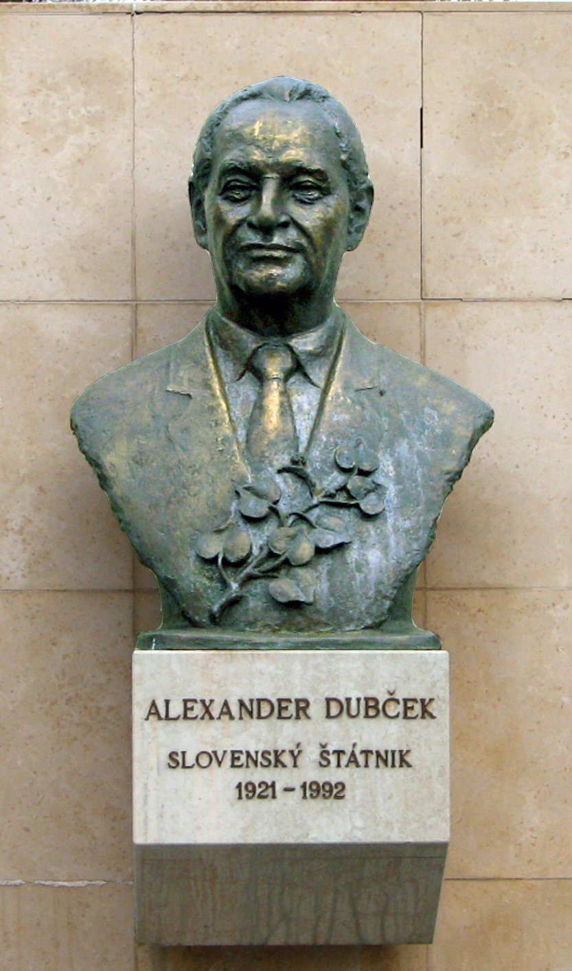 Bronzová busta Alexandra Dubčeka, autor Ľudmila Cvengrošová